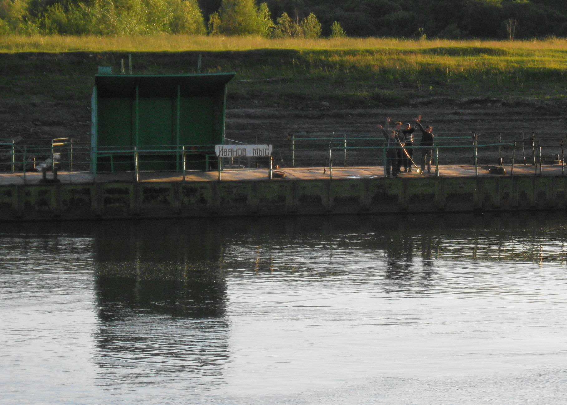 Пристань на реке Иртыш Иванов Мыс (Омская область)